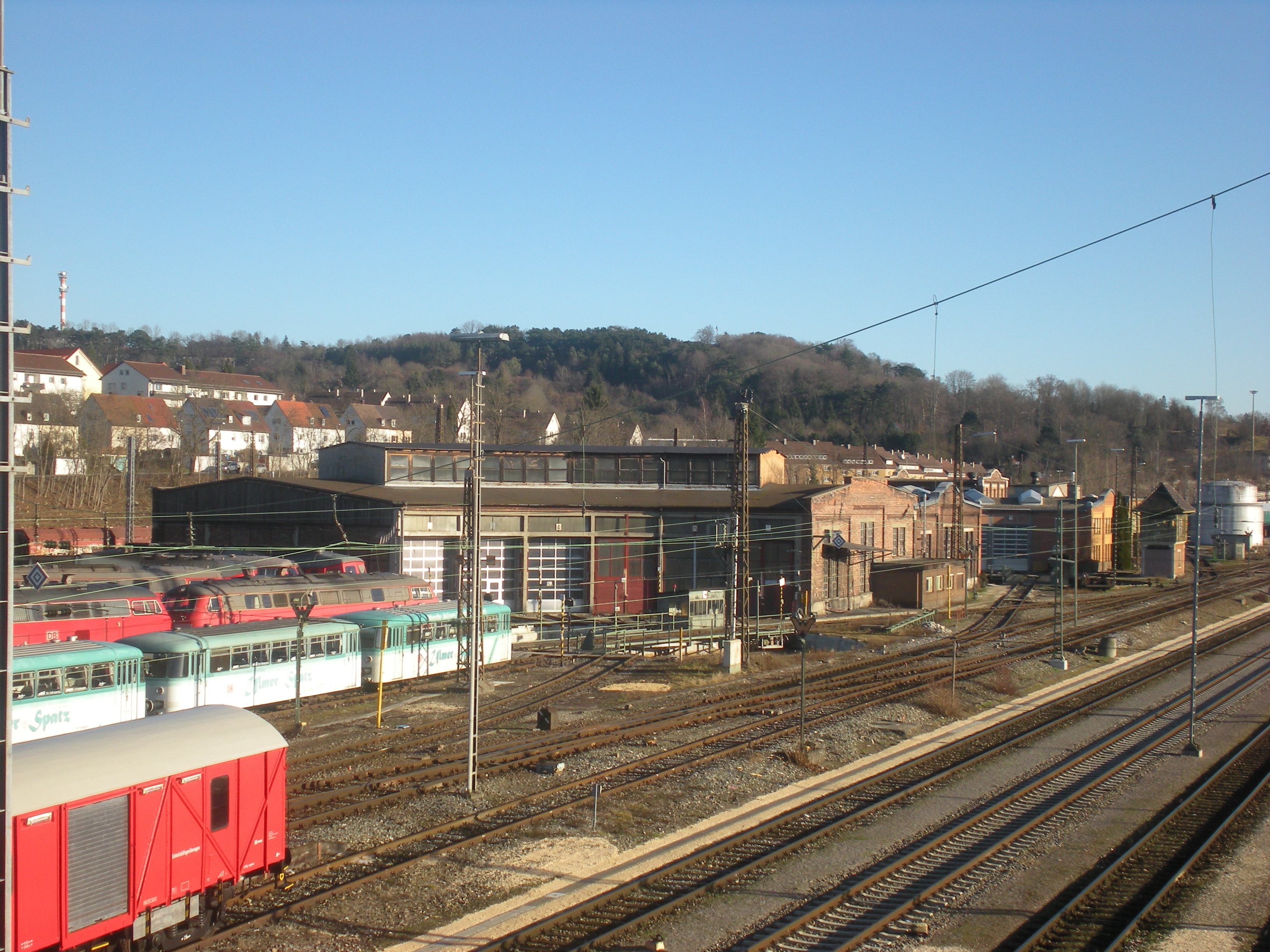 Ringlokschuppen des Bahnbetriebswerks Ulm Rbf, von der Beringerbrücke aus gesehen, links Diesellokomotiven verschiedener Baureihen, der Uerdinger Schienenbus Ulmer Spatz und ein Güterwagen